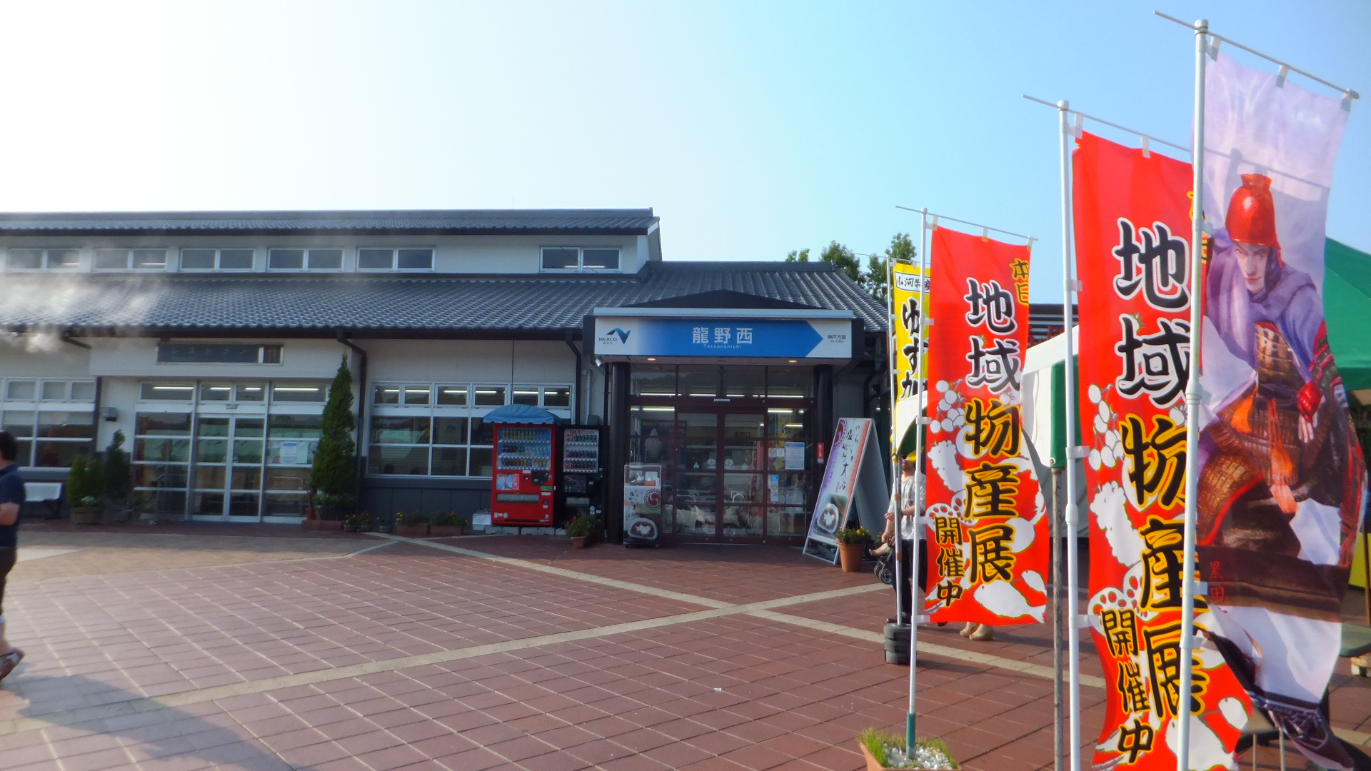 龍野西サービスエリア